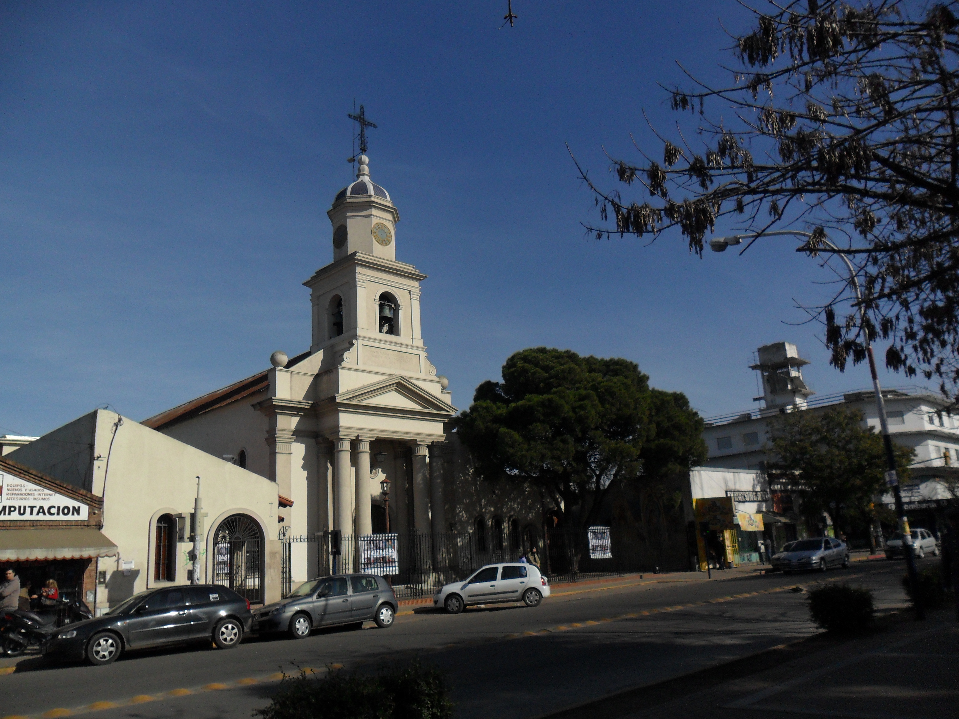 Catedral de Moreno